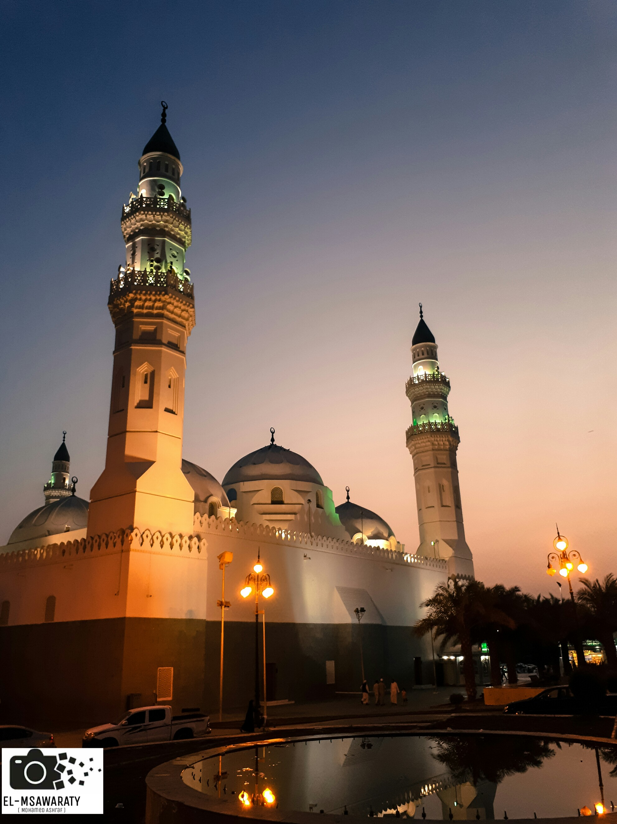 هو اول مسجد فى الاسلام يوجد فى المدينة المنورة